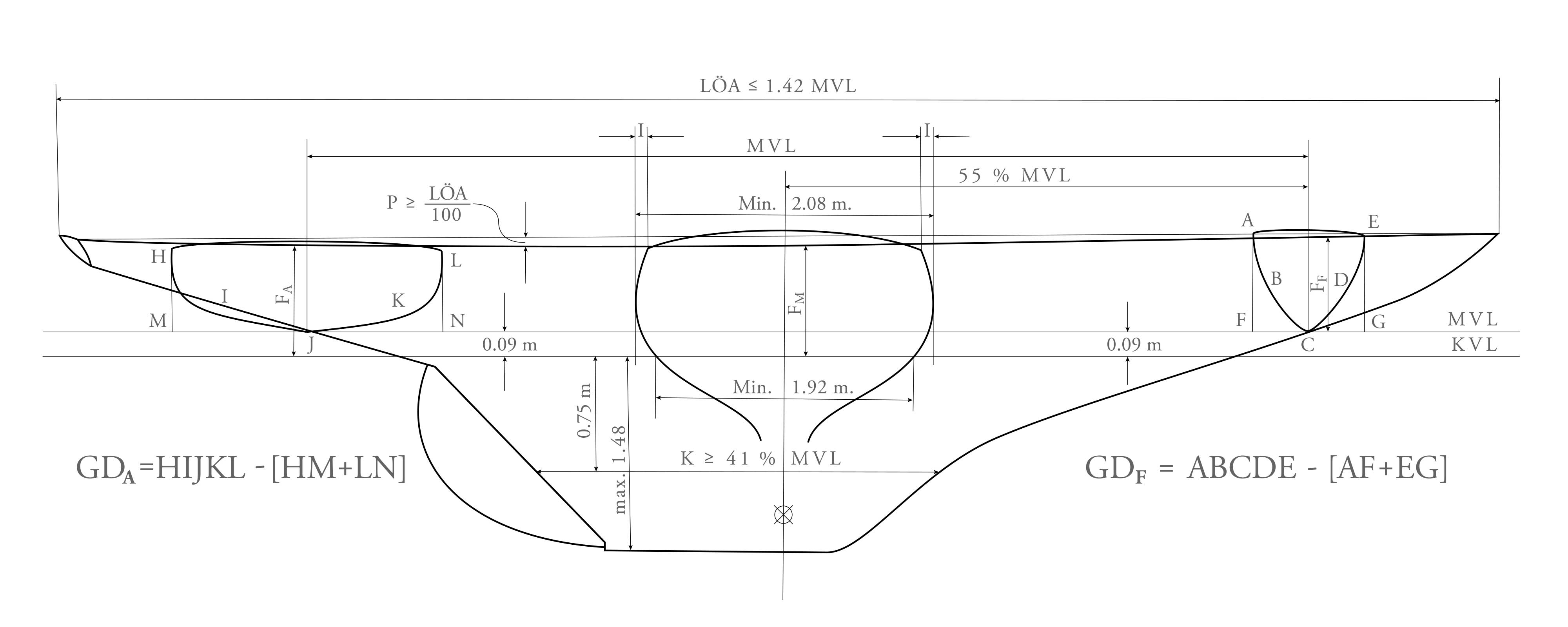 Nordiska kryssarregeln mätfigur